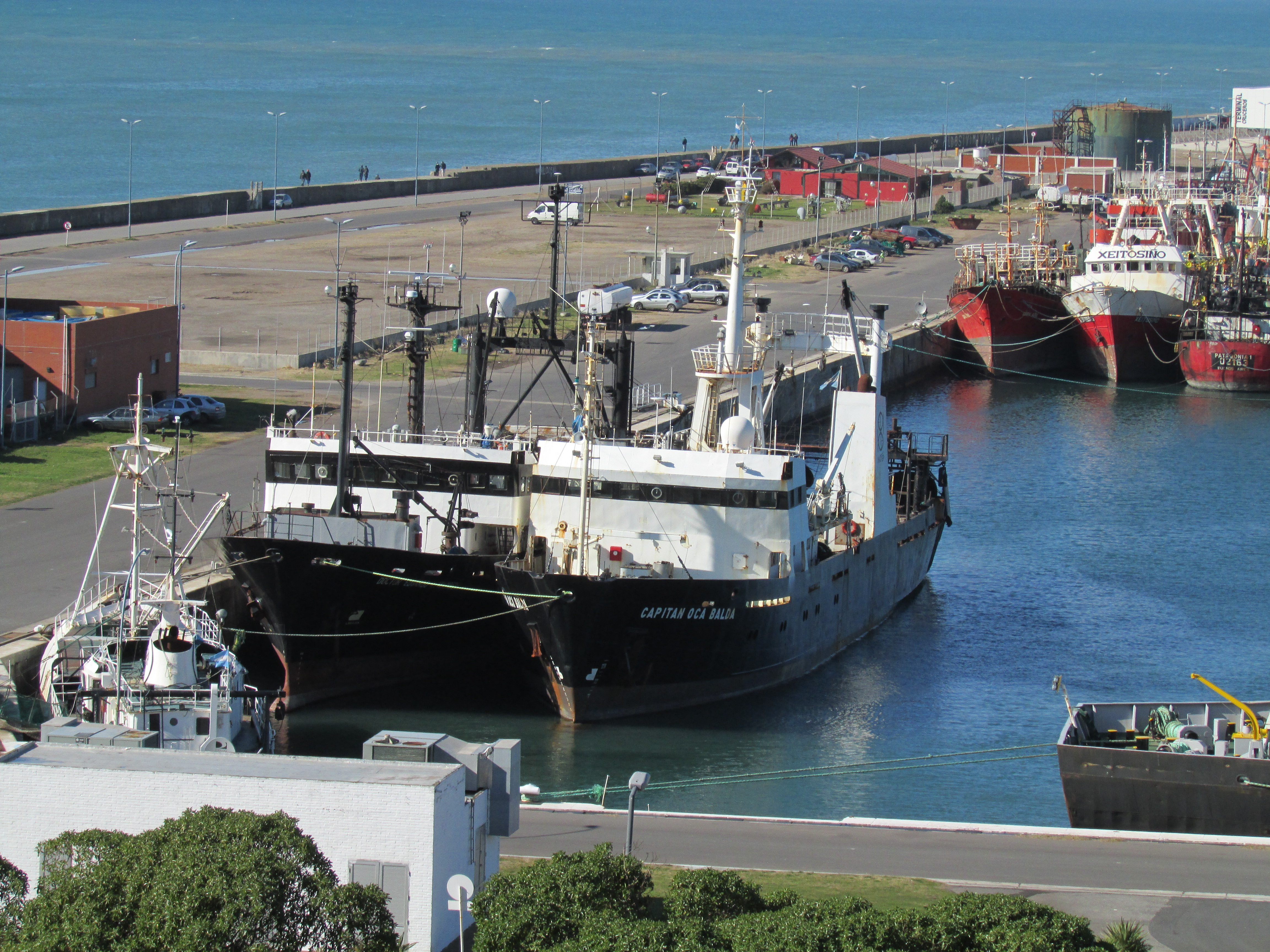 Buque Capitán Oca Balda en la escollera norte del puerto de Mar del Plata, provincia de Buenos Aires, Argentina.